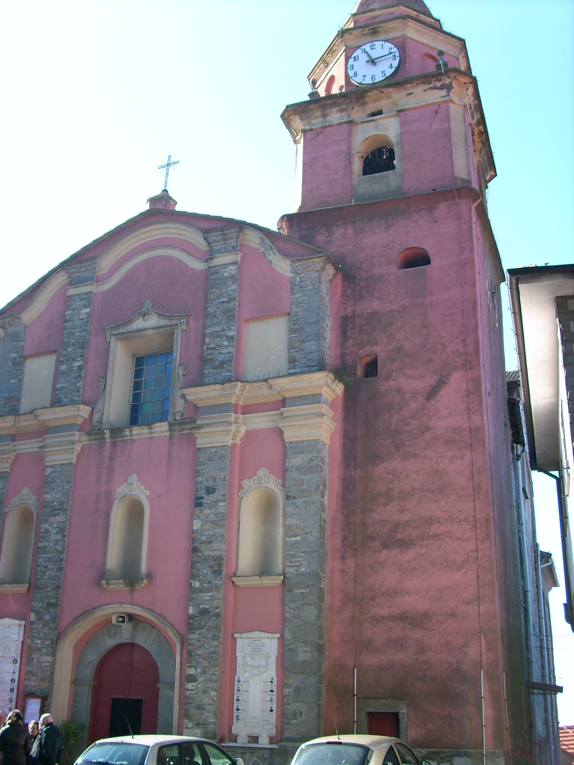 Chiesa di San Giovanni Battista di Suvero, Rocchetta di Vara, Liguria, Italy